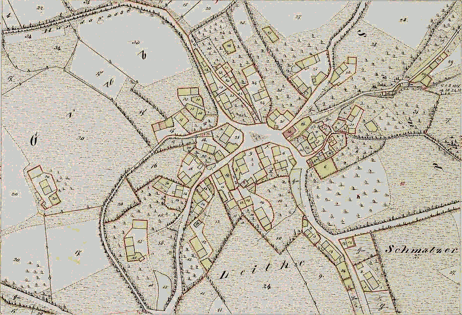 Bayreuth, Flurkarte von Oberpreuschwitz (Maßstab: 1:2500).